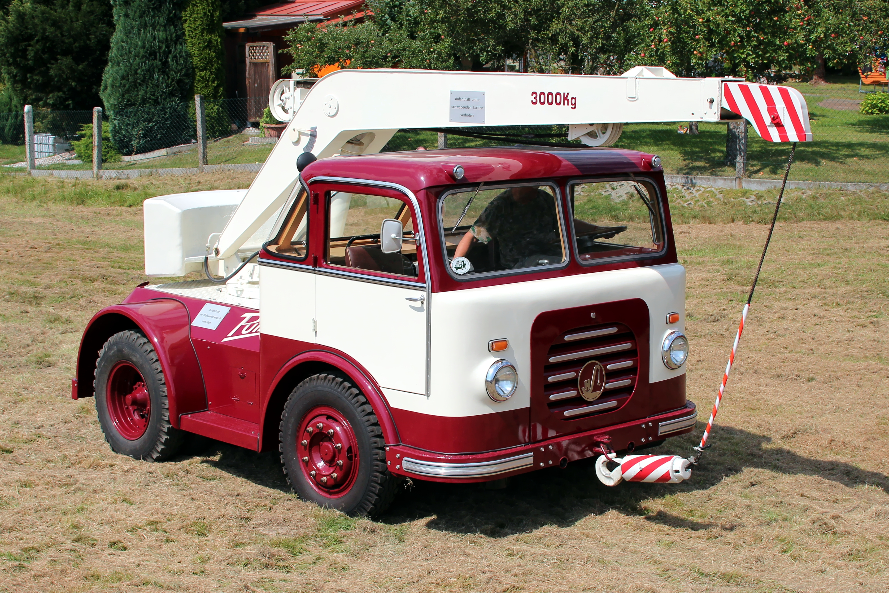 Ein Autodrehkran ADK III/3 »Puma« aus dem VEB Hebezeugwerk Sebnitz zum 5. Treffen »Damals die Renner« in Schmannewitz 2016.(Fahrzeug im Bestand des Sächsischen Nutzfahrzeugmuseums in Hartmannsdorf)